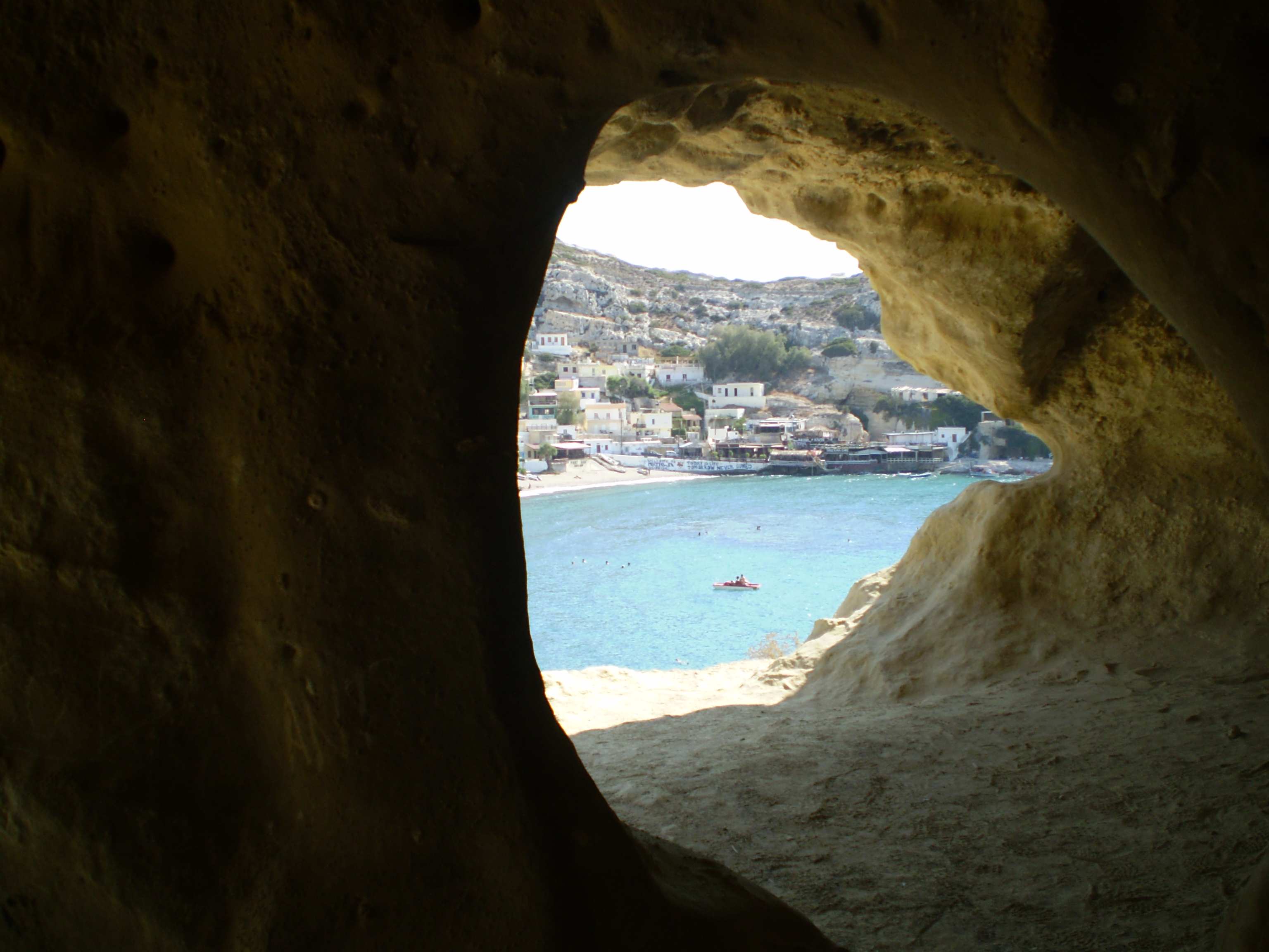 Σπηλιά στα Μάταλα